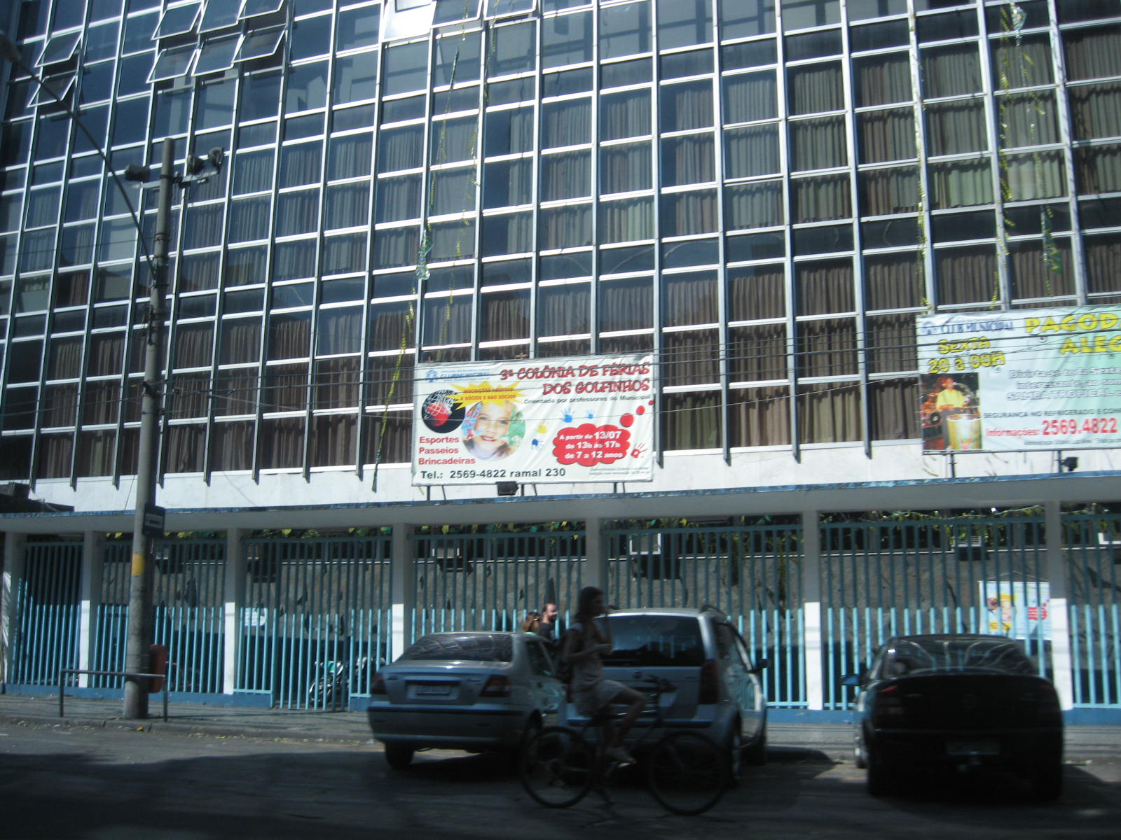 Fachada do Club Municipal, localizado na Tijuca, Rio de Janeiro.